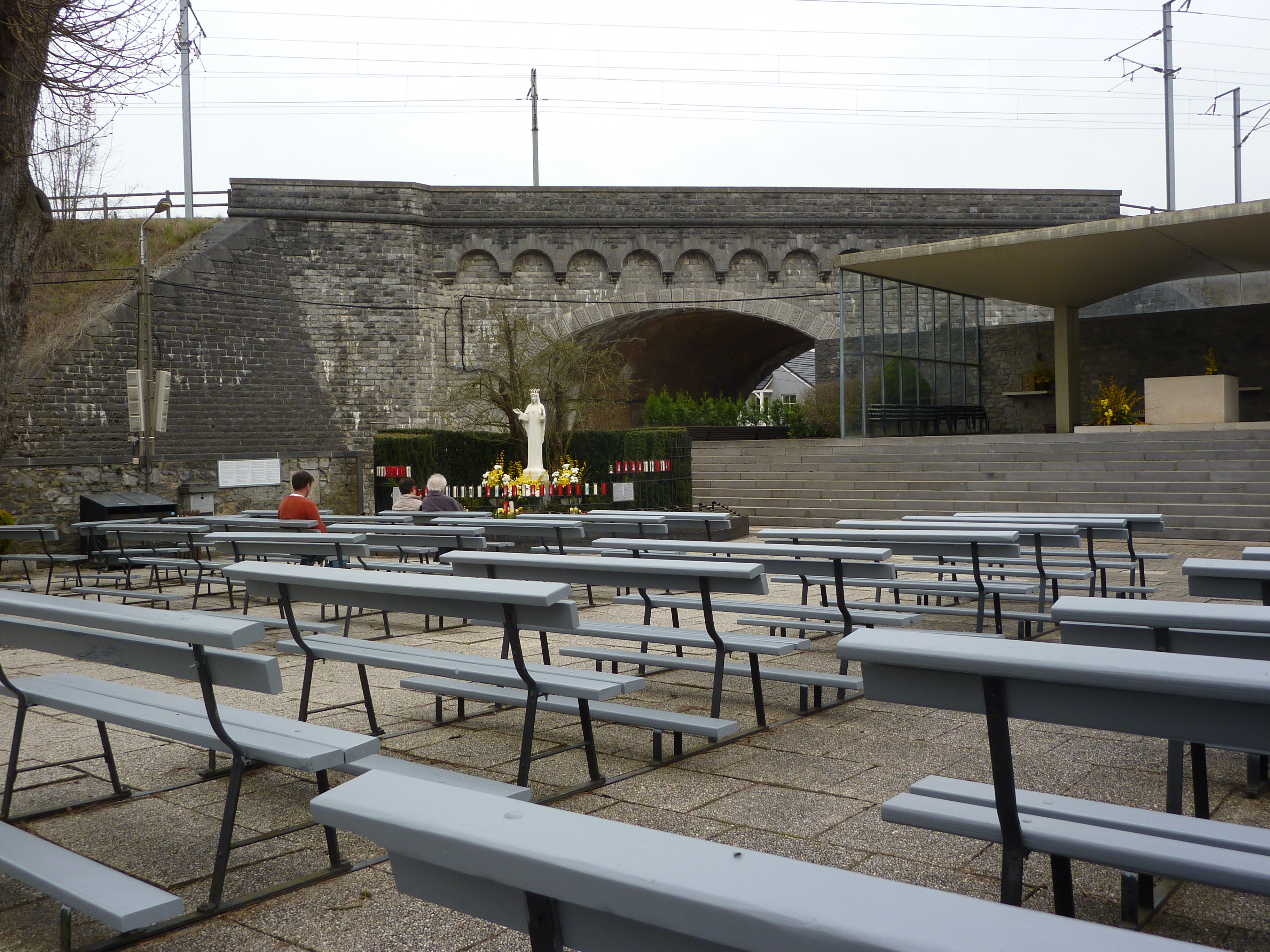 Apparitions mariales de Beauraing